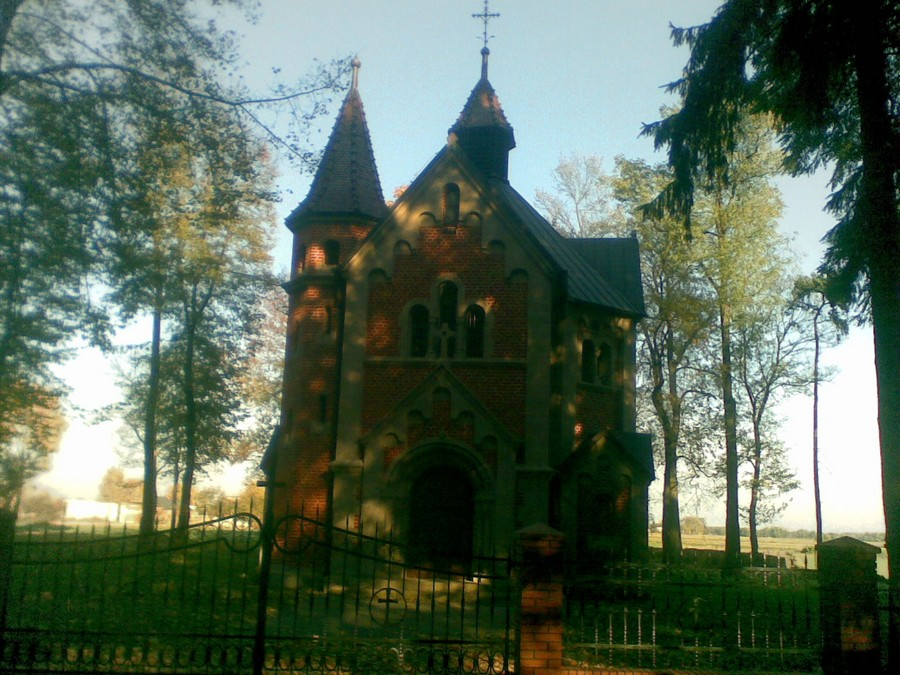 Brody, kaplica